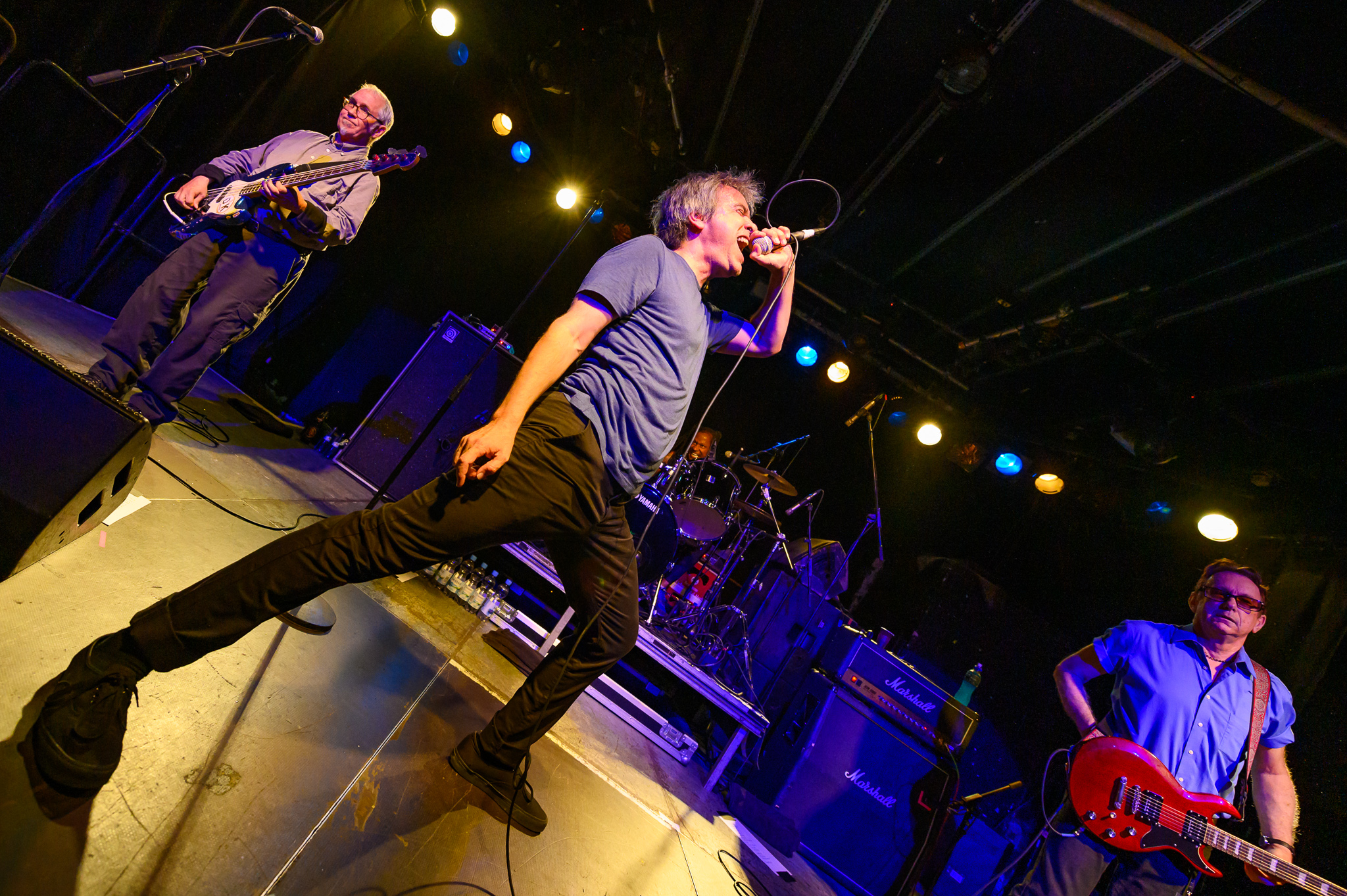 Concertbüro Franken,D. H. Peligro,Darren Henley,Dead Kennedys,Der Hirsch,East Bay Ray,Geoffrey Lyall,Klaus Flouride,Konzert,Livekonzert,Livemusik,Raymond John Pepperell,Ron "Skip" Greer